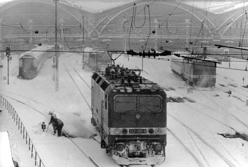 Leipzig, Hauptbahnhof, Winter ADN-ZB Grubitzsch 9.1.87 Leipzig: Wetter- Schneeverwehungen bis zu einer Höhe von 80 Zentimeter führten im Bereich des Leipziger Hauptbahnhofes zu Störungen im Verkehrsablauf. In der Nacht und in den Morgenstunden waren rund 100 zusätzliche Arbeitskräfte kurzfristig eingesetzt, um die Weichen freizulegen und umzustellen.